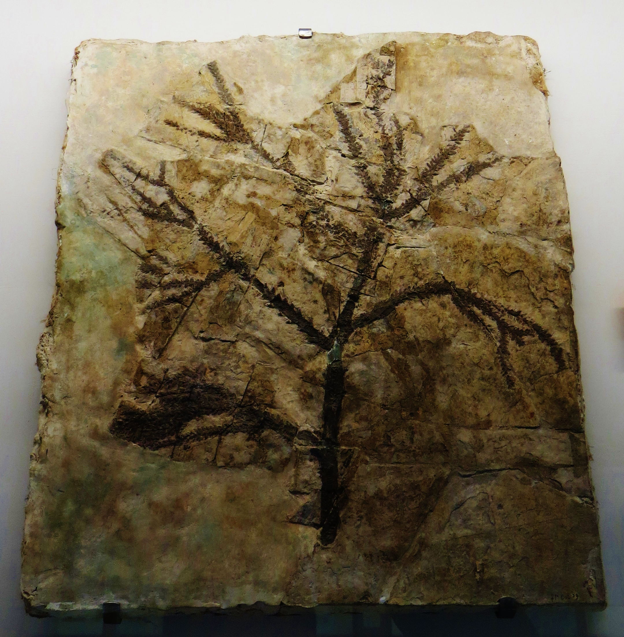 Fossil of Pagiophyllum, an extinct plant- Took the photo at Museo di Storia Naturale di Verona